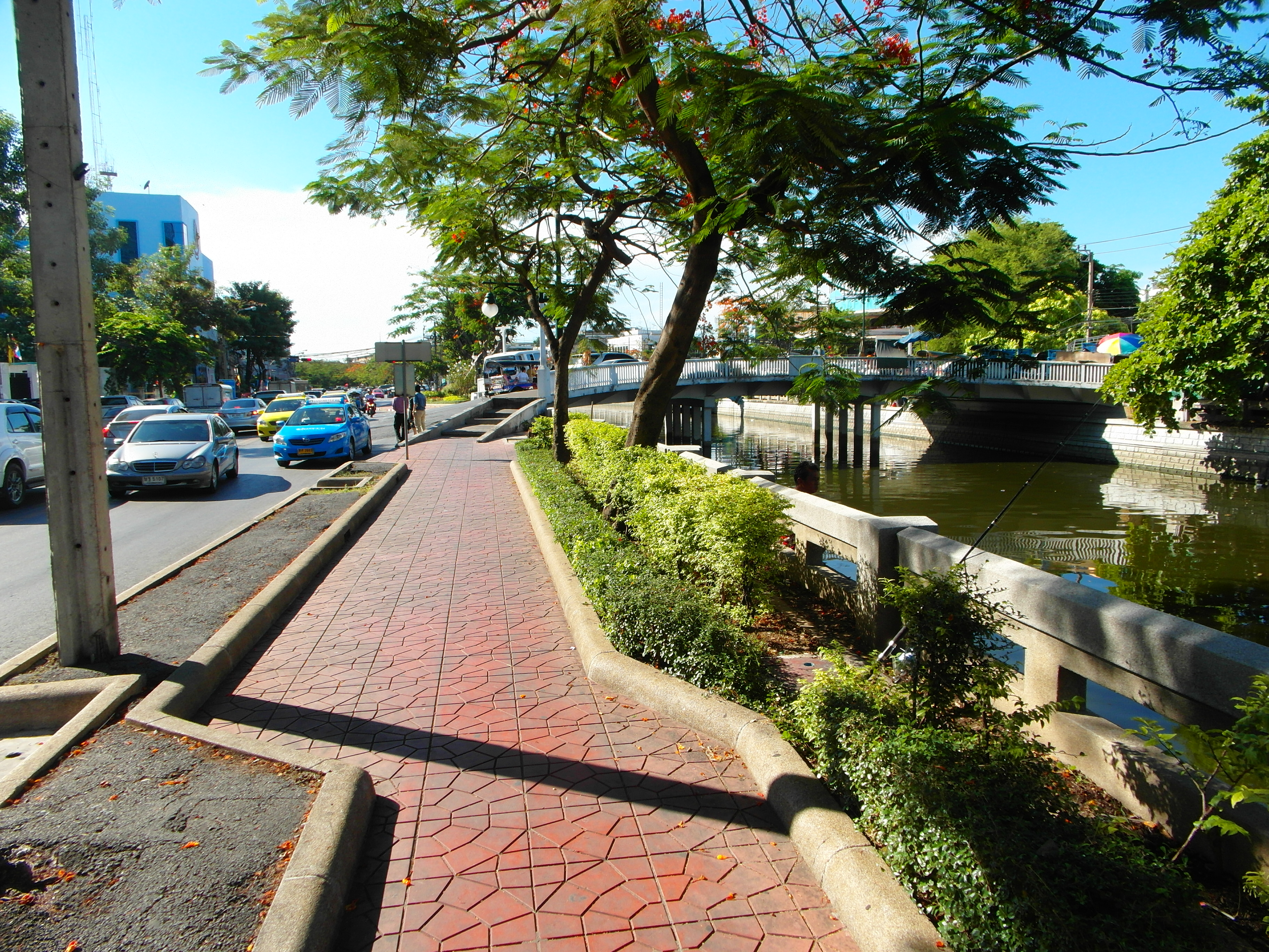 Bangkok 2013 april